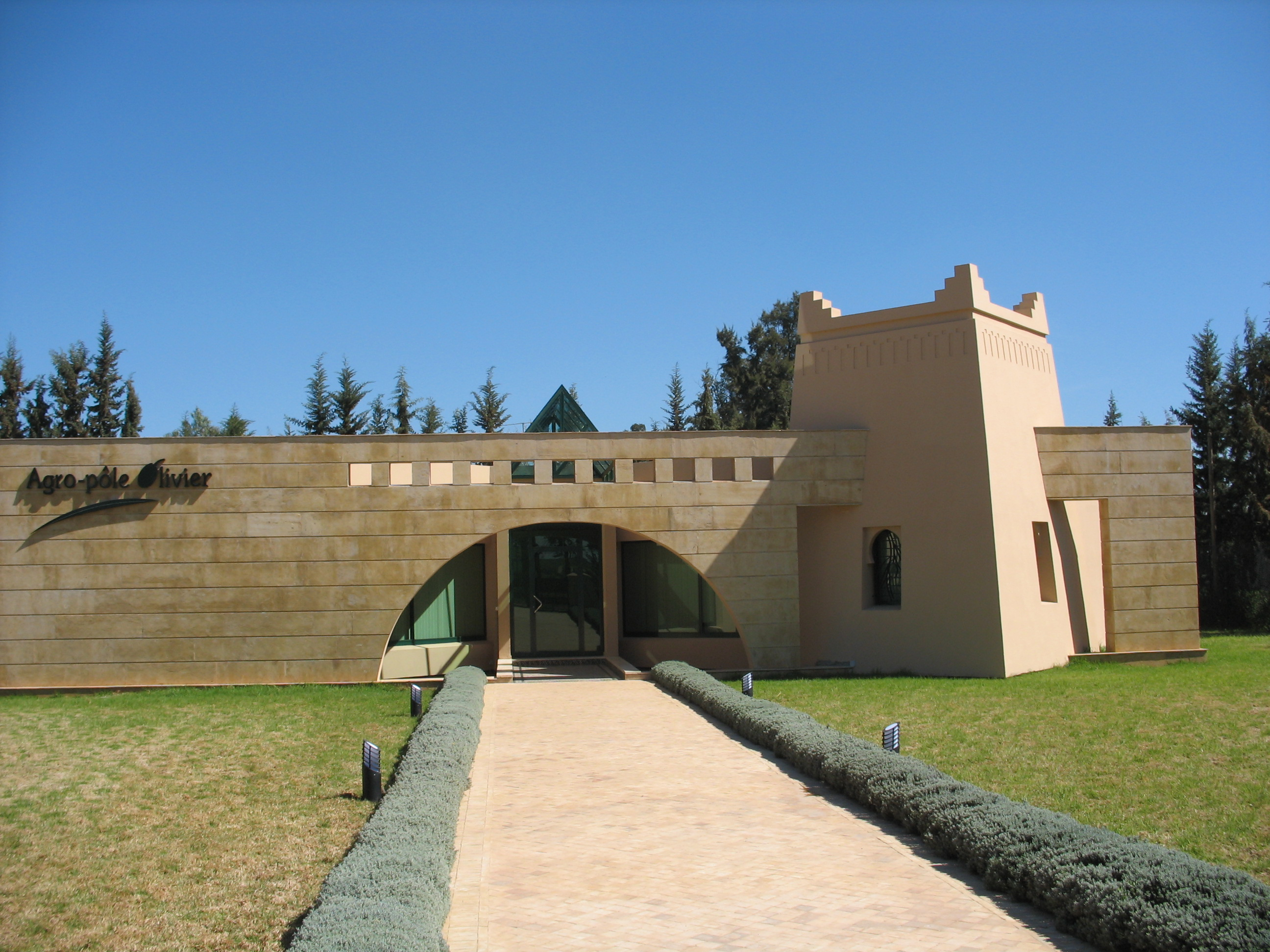 Agro-pôle de la filière oléicole - site de l'Ecole Nationale d'Agriculture de Meknès